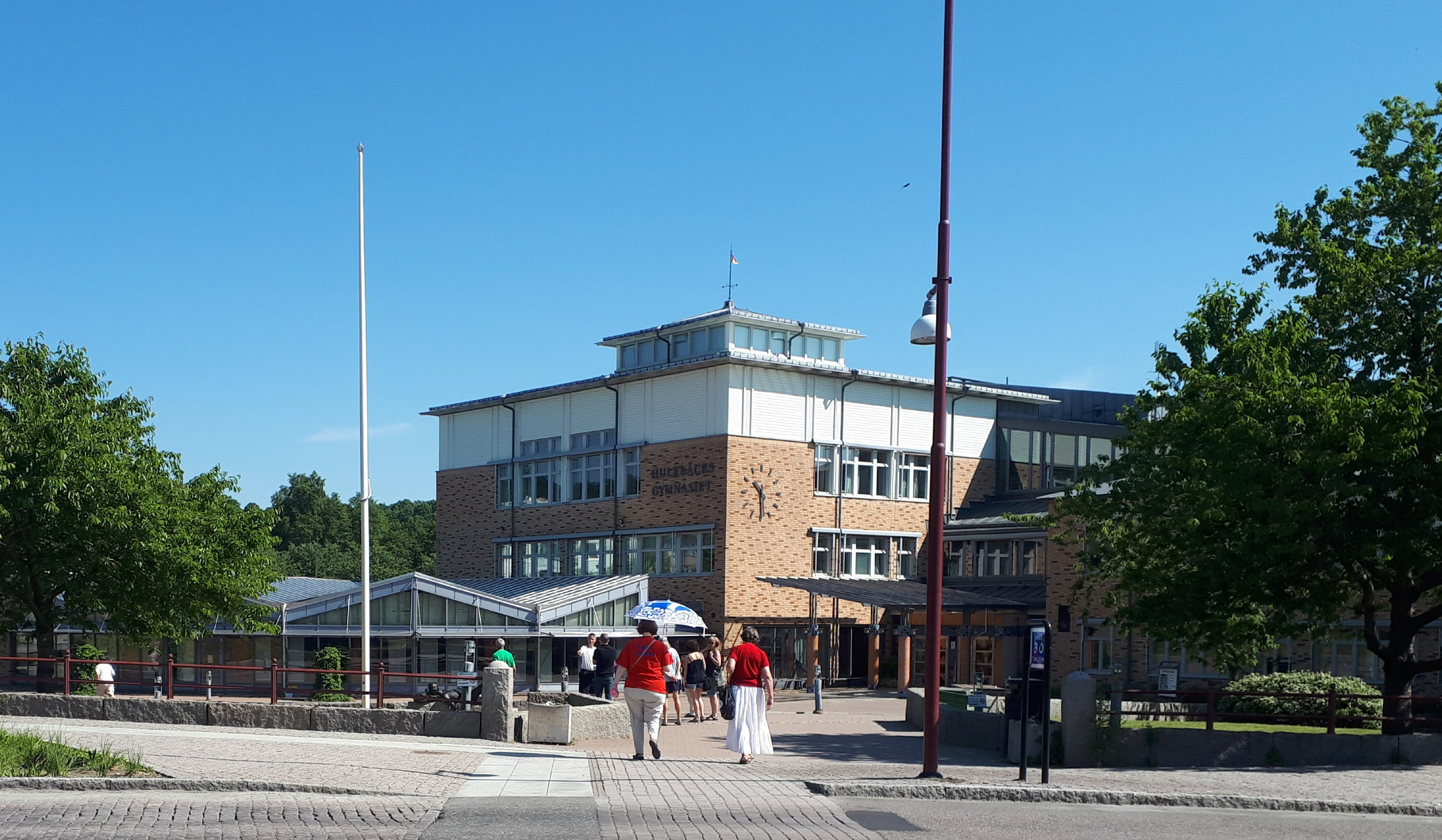 Huvudentrén och matsalen till gymnasiet Hulebäcksgymnasiet i Mölnlycke, Härryda Kommun i juni 2018.